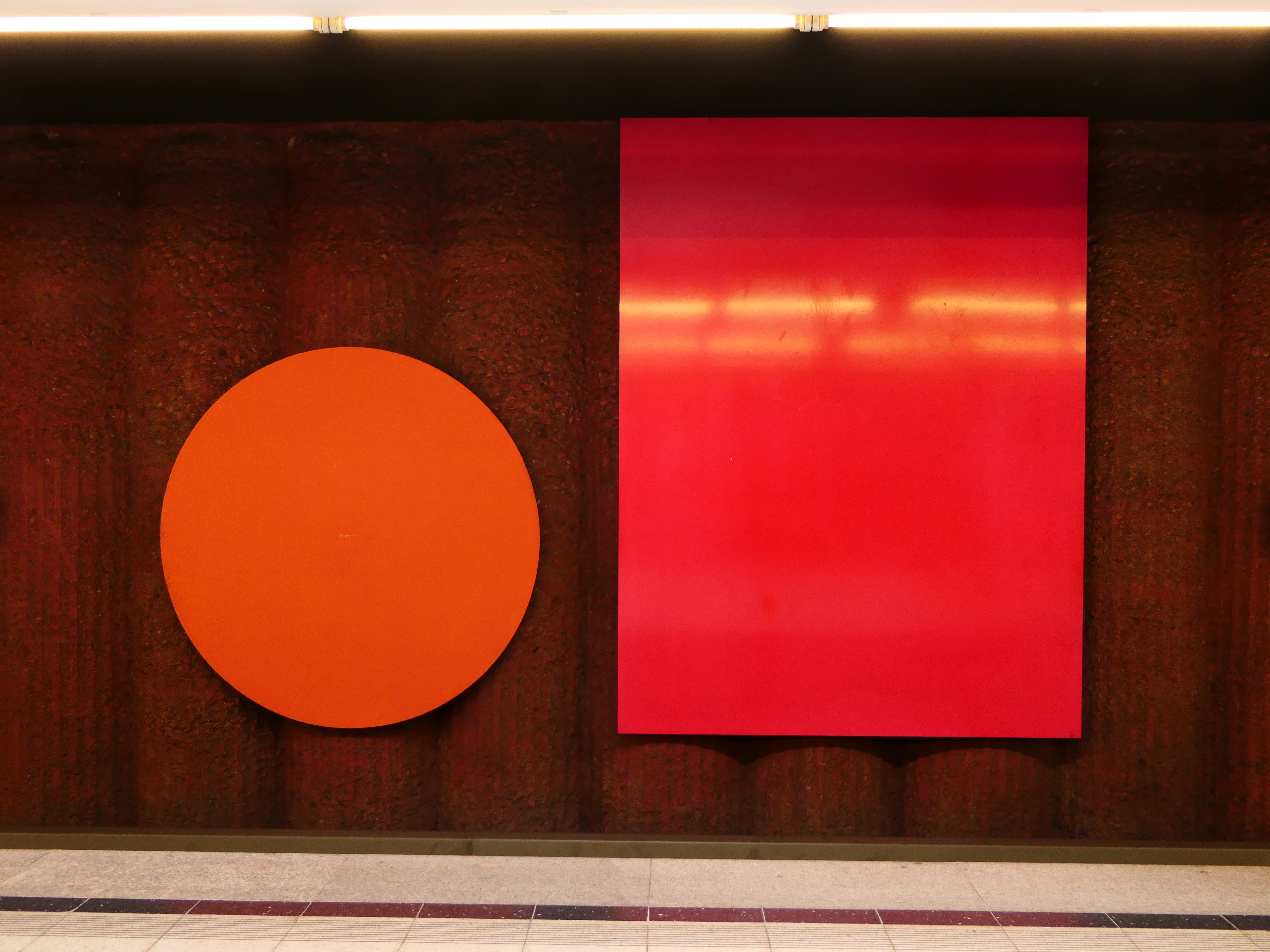 Zweiteiliges Objekt, Acryl auf Aluminium, von Rupprecht Geiger am U-Bahnhof Machtlfinger Straße in München.